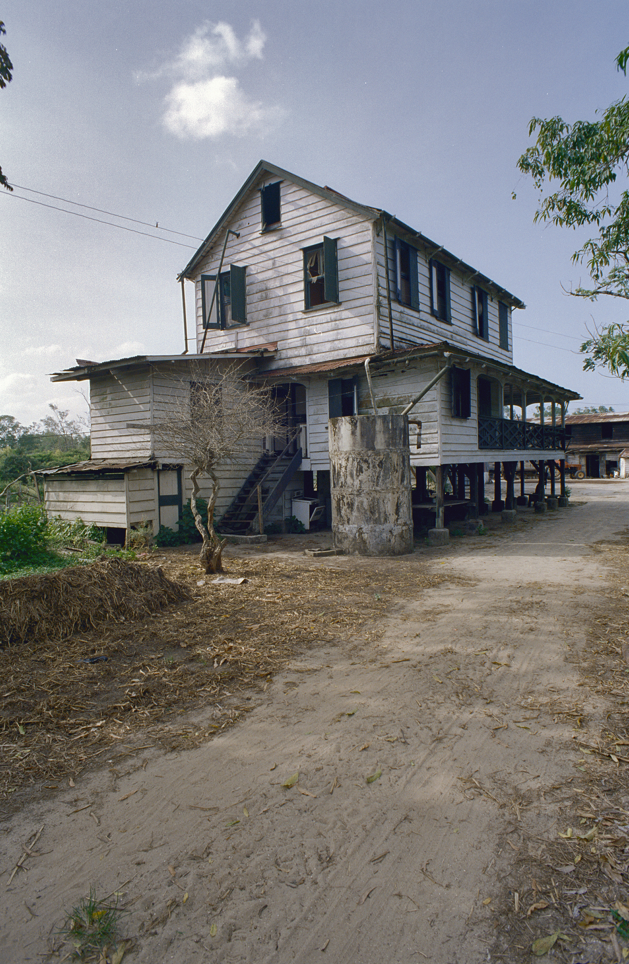 Koloniale geschiedenis: Overzicht huis met rechtsvoor een regenton (opmerking: Suriname Reis Loek Tangel)